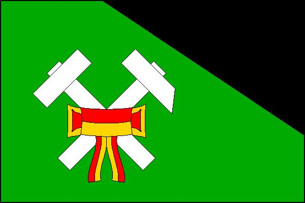 Vlajka obce Zastávka v okrese Brno-venkov